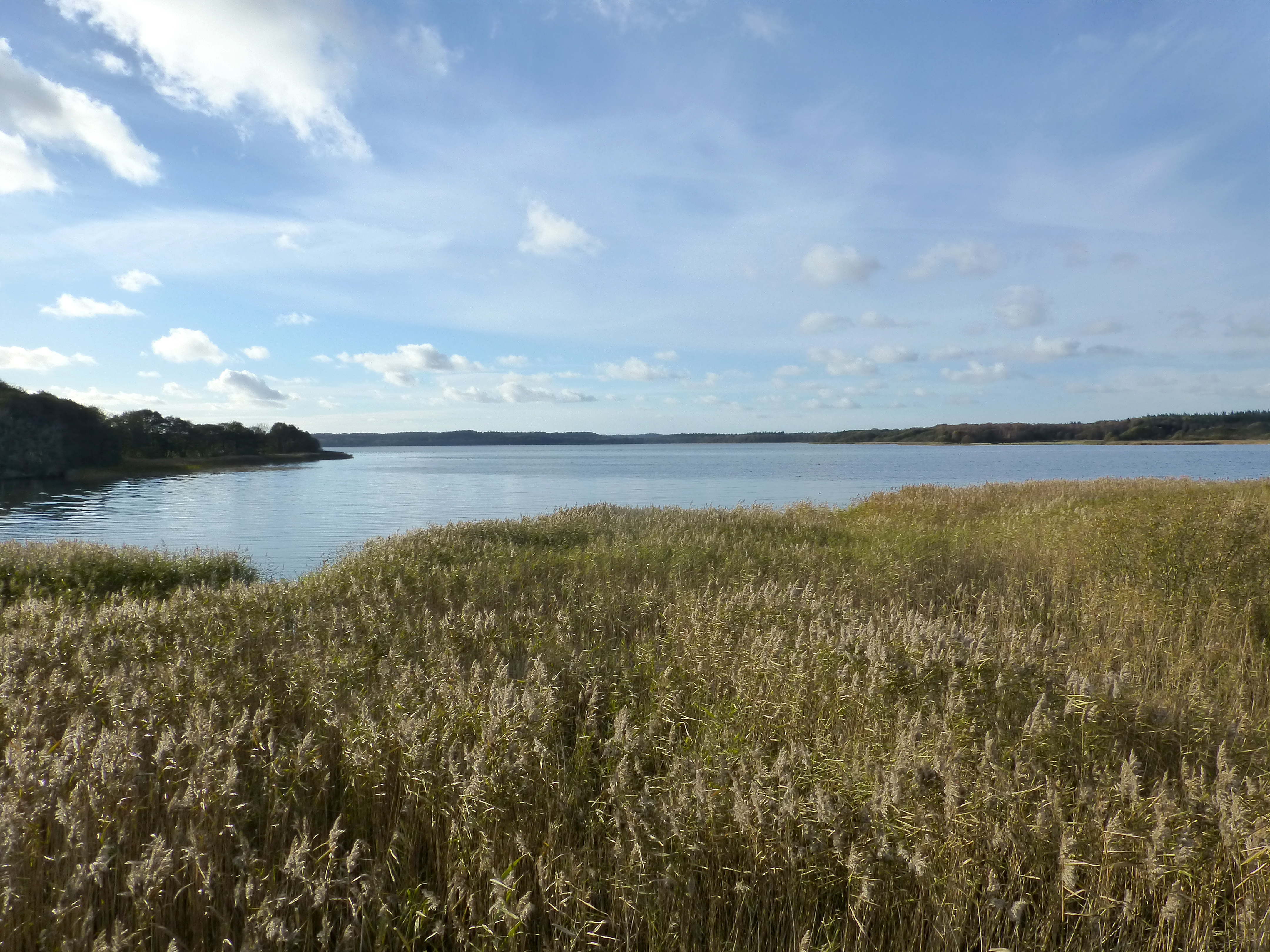 Stubbe Sø set mod vest fra fugletårnet ved østenden